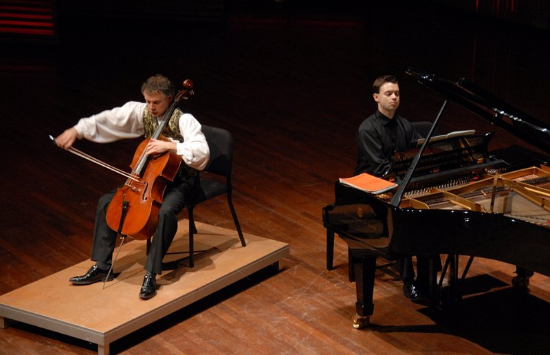 Pieter Wispelwey, Dutch cello player, and Dejan Lazic, Pianist, 30 january 2007 Picture by Fai Ho, Dutch photographer. Licence information (in Dutch) Ik, Fai Ho, fotograaf te Amsterdam, bij Digitally.nl stel de afbeeldingen van Pieter Wispelwey en zijn begeleider Dejan Lazic, gemaakt op 30 januari 2007 in het Muziekgebouw aan het IJ ter beschikking onder een multi-licentie, dat wil zeggen onder zowel de GFDL als Creative Commons CC-BY-SA ( licentie. Ik ben de maker van deze foto's en beschik over het copyright. Zowel de heer Wispelwey als de heer Lazic hebben geen bezwaar tegen publicatie onder genoemde licenties. Mijn naam dient altijd als auteur bij de foto's te worden vermeld zoals de GFDL en de Creative Commons licenties voorschrijven. De toestemming voor het gebruik van deze mail is opgeslagen op OTRS van de Nederlandstalige Wikipedia, onder nummer OTRS nummer 2007041310008751